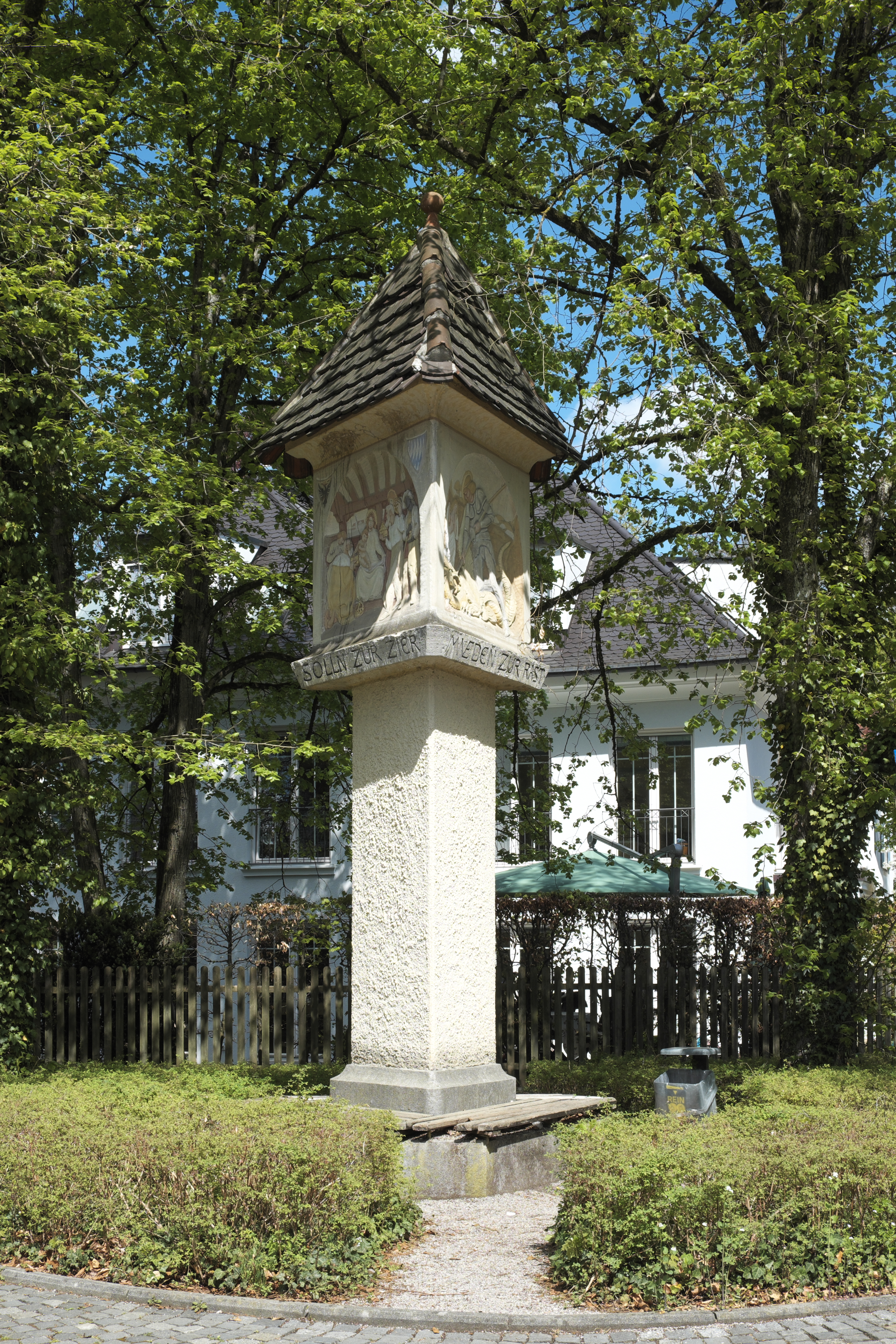 Sollner Säule in Solln im Stadtbezirk Thalkirchen-Obersendling-Forstenried-Fürstenried-Solln in München (Bayern/Deutschland), 1911 von Balthasar Schmitt errichtet